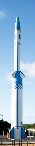 Foguete Sonda IV em exibição